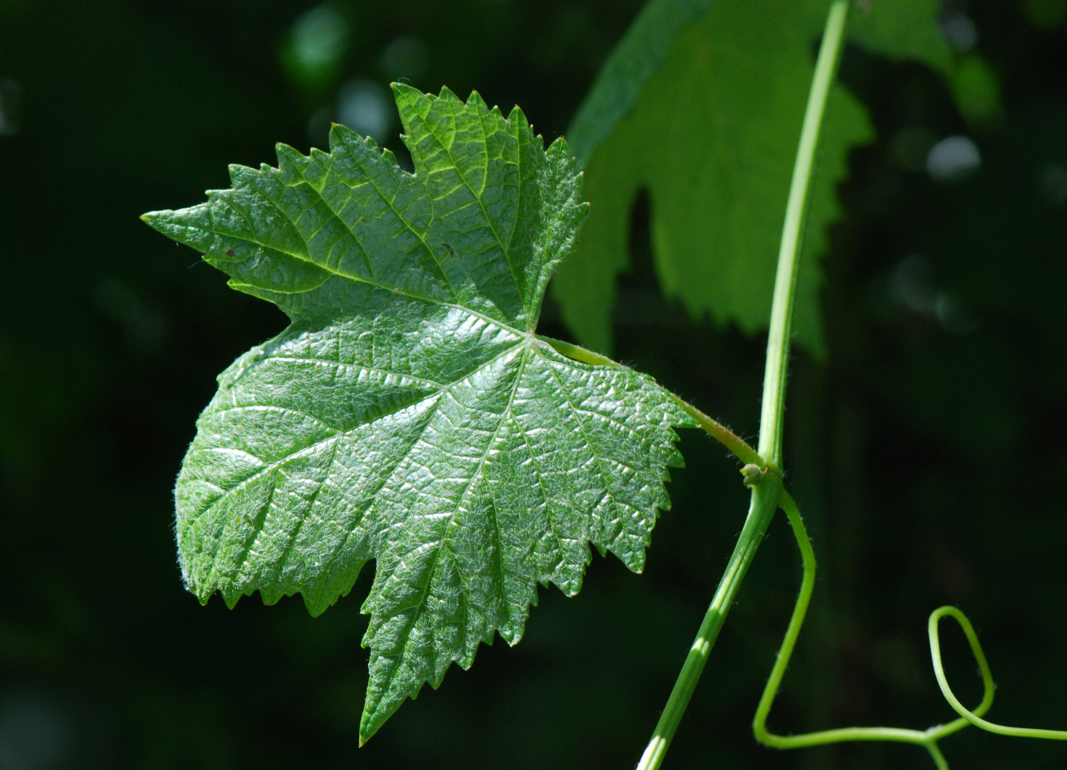 Vitis vinifera ssp sylvestris, lambrusque spontanée mâle, bord de la Charente (Cognac)